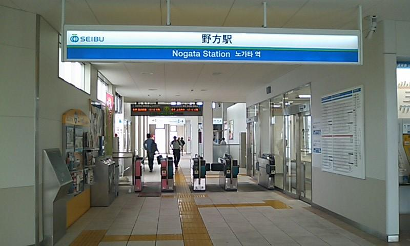 西武新宿線 野方駅 新改札口